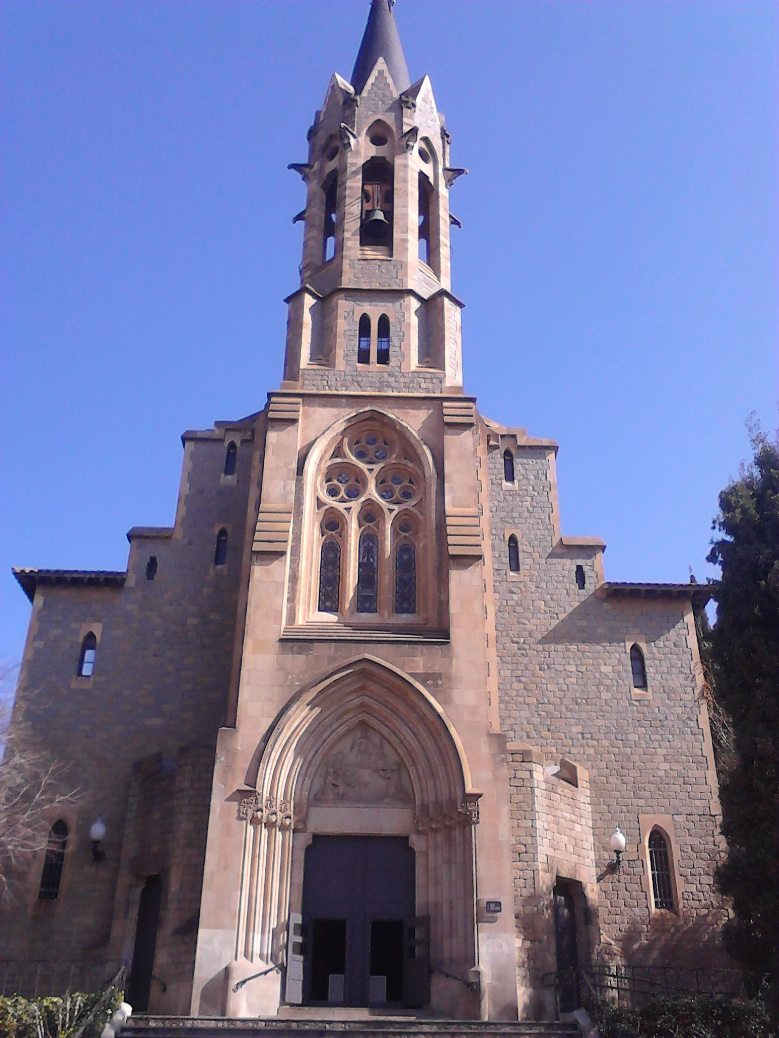 Església nova de Santa Coloma de Gramenet